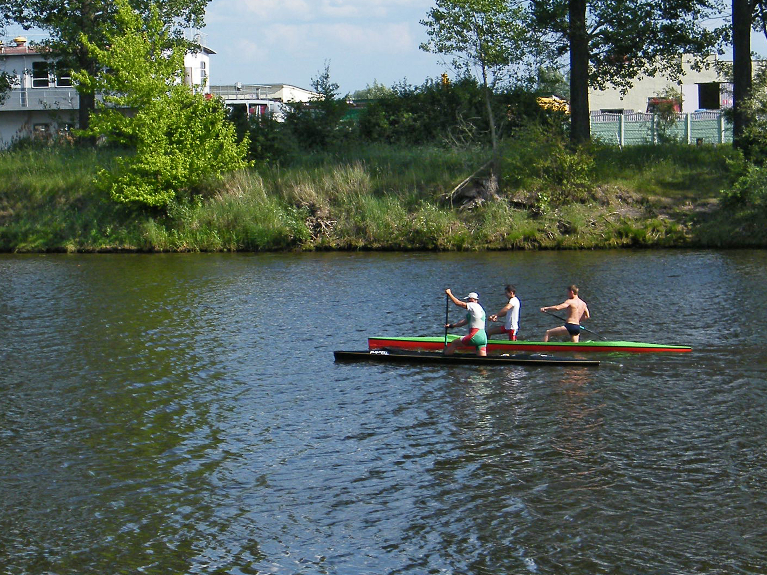 Тренировка гребцов